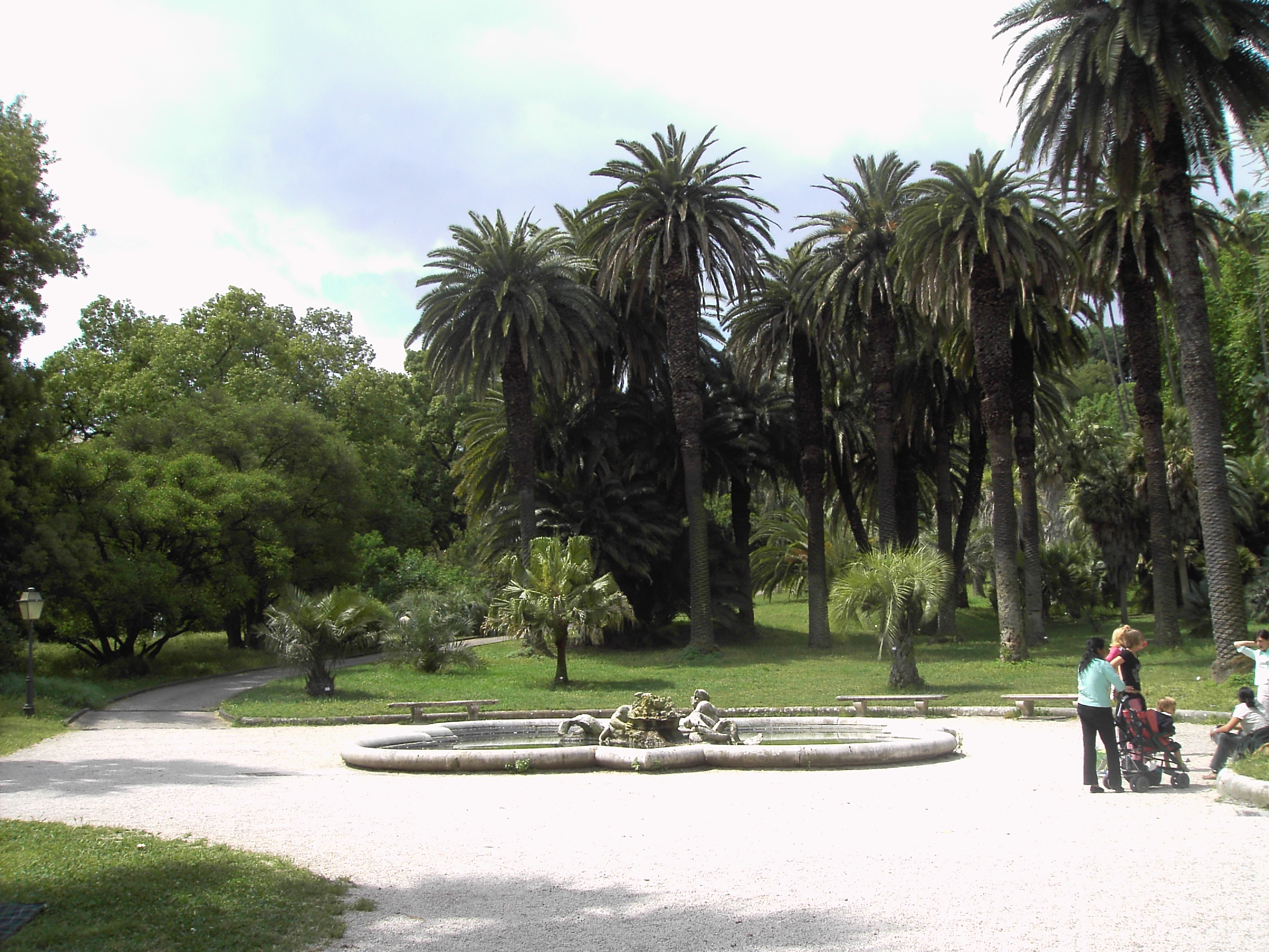 Roma , Orto botanico: fontana dei Tritoni